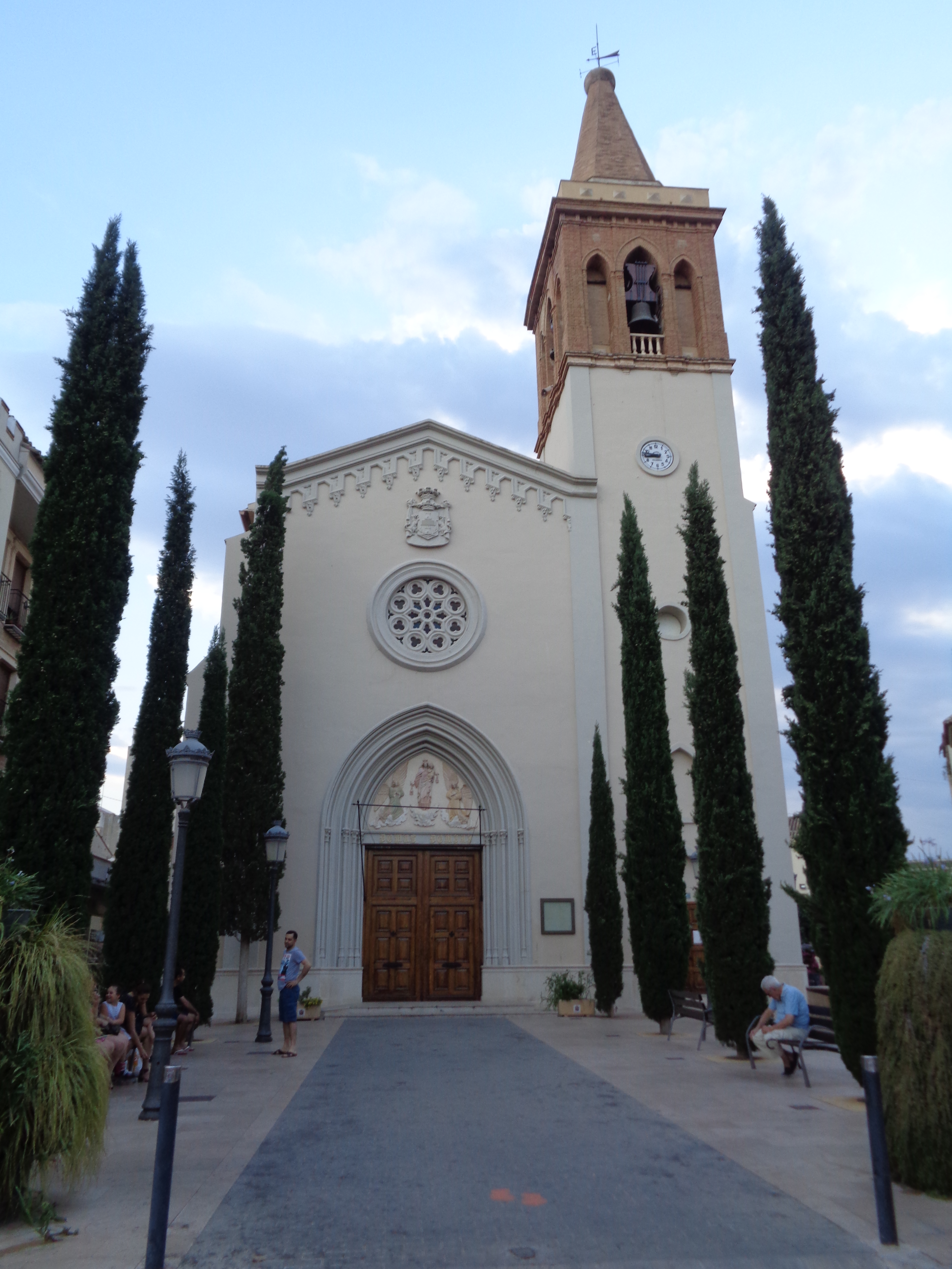 L'Eliana.